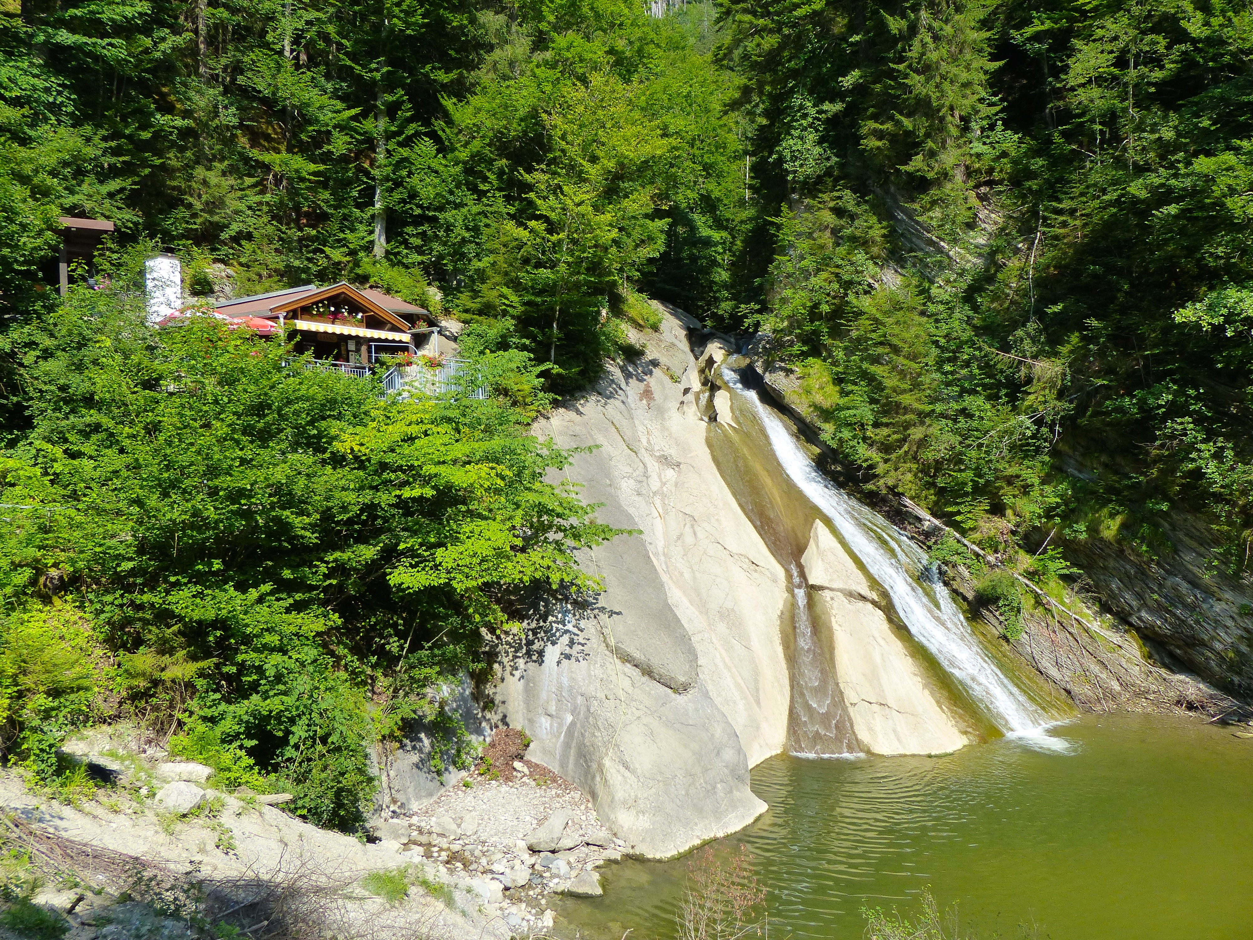 WikiProjekt Landstreicher: Schleierfälle in der Starzlachklamm